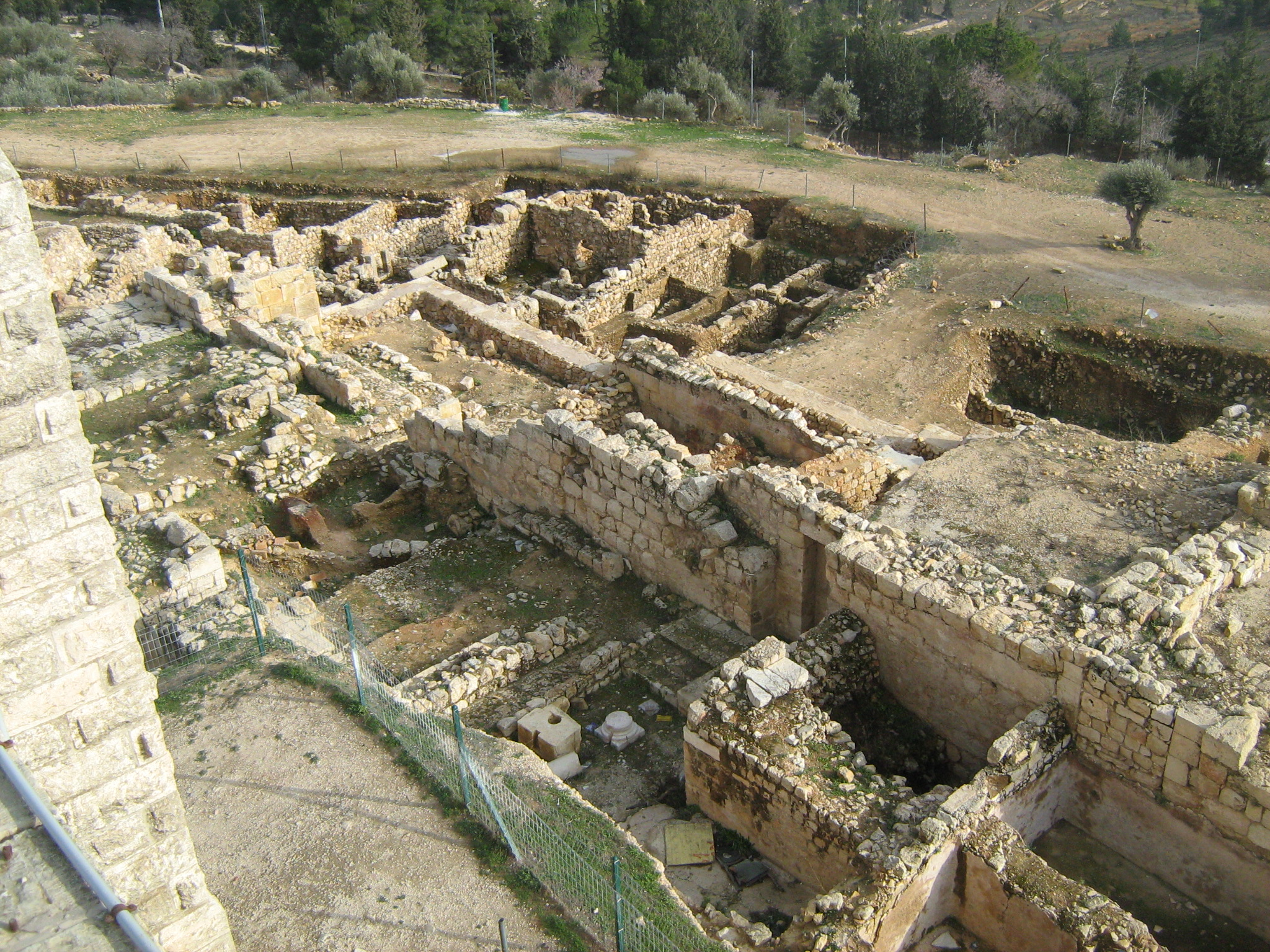 נבי סמואל